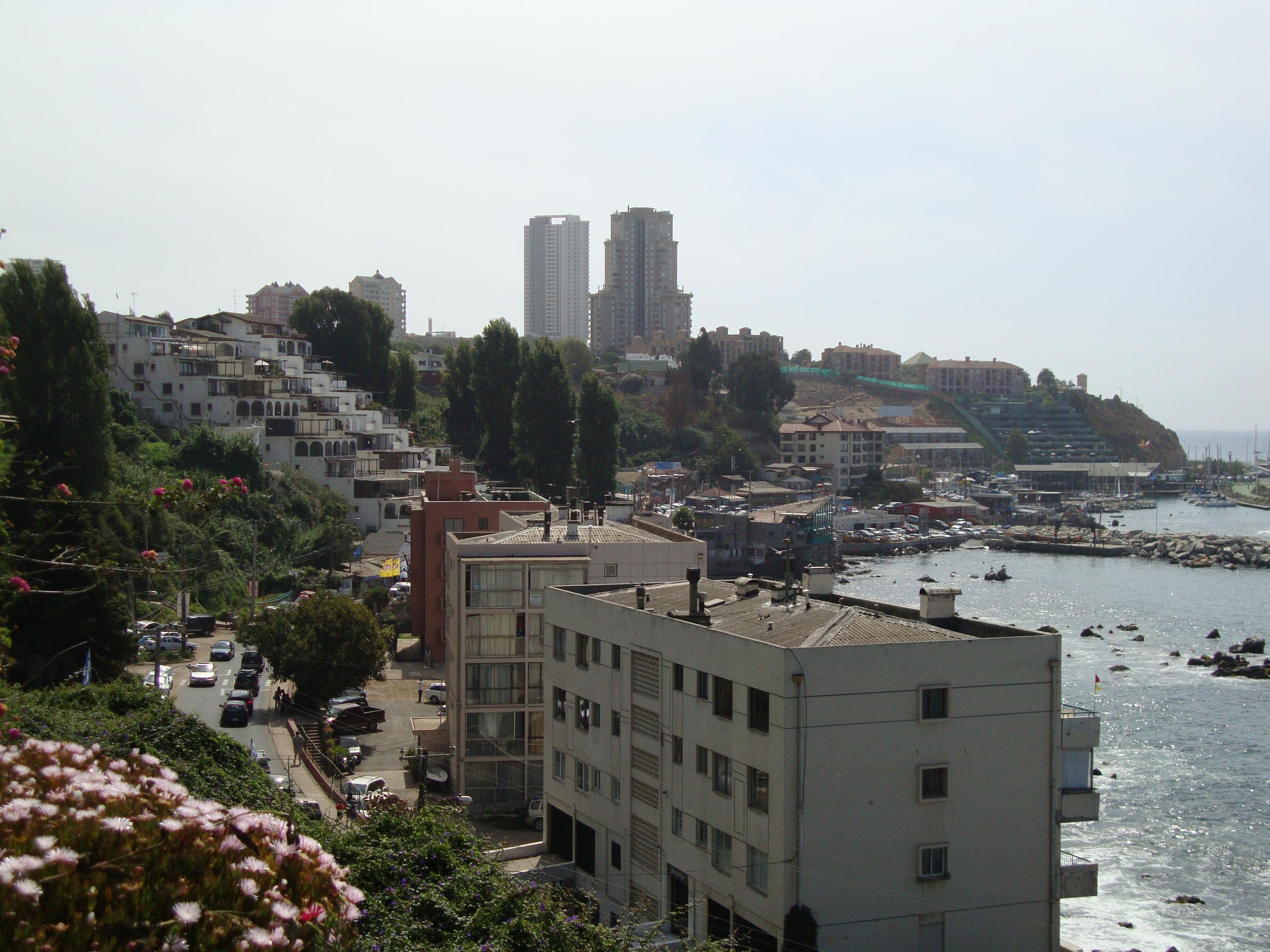 Vista de los edificios costeros desde la Caleta Higuerillas en Concón (Chile)